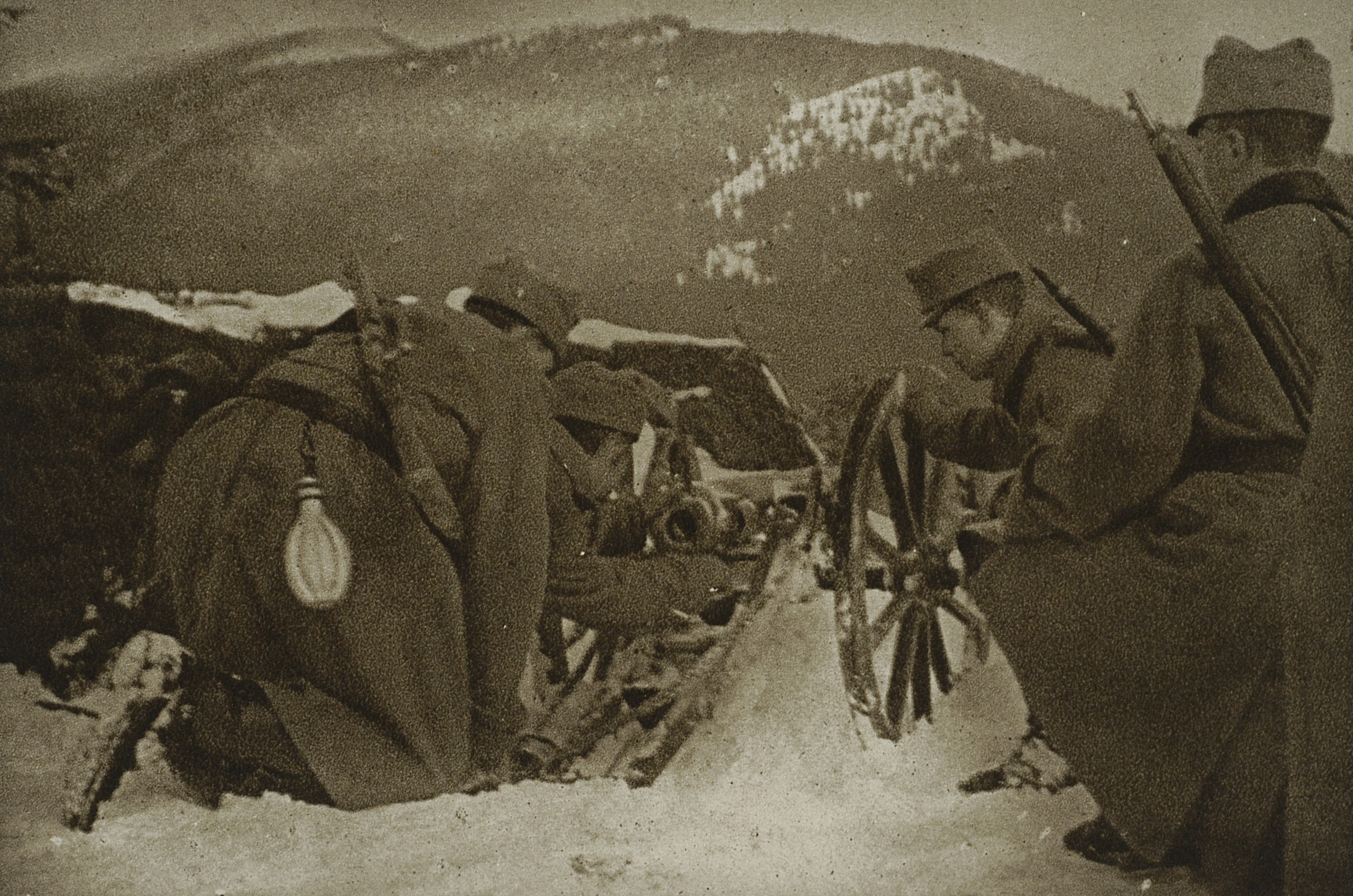 Artyleria Legionów Polskich. Gorgany.